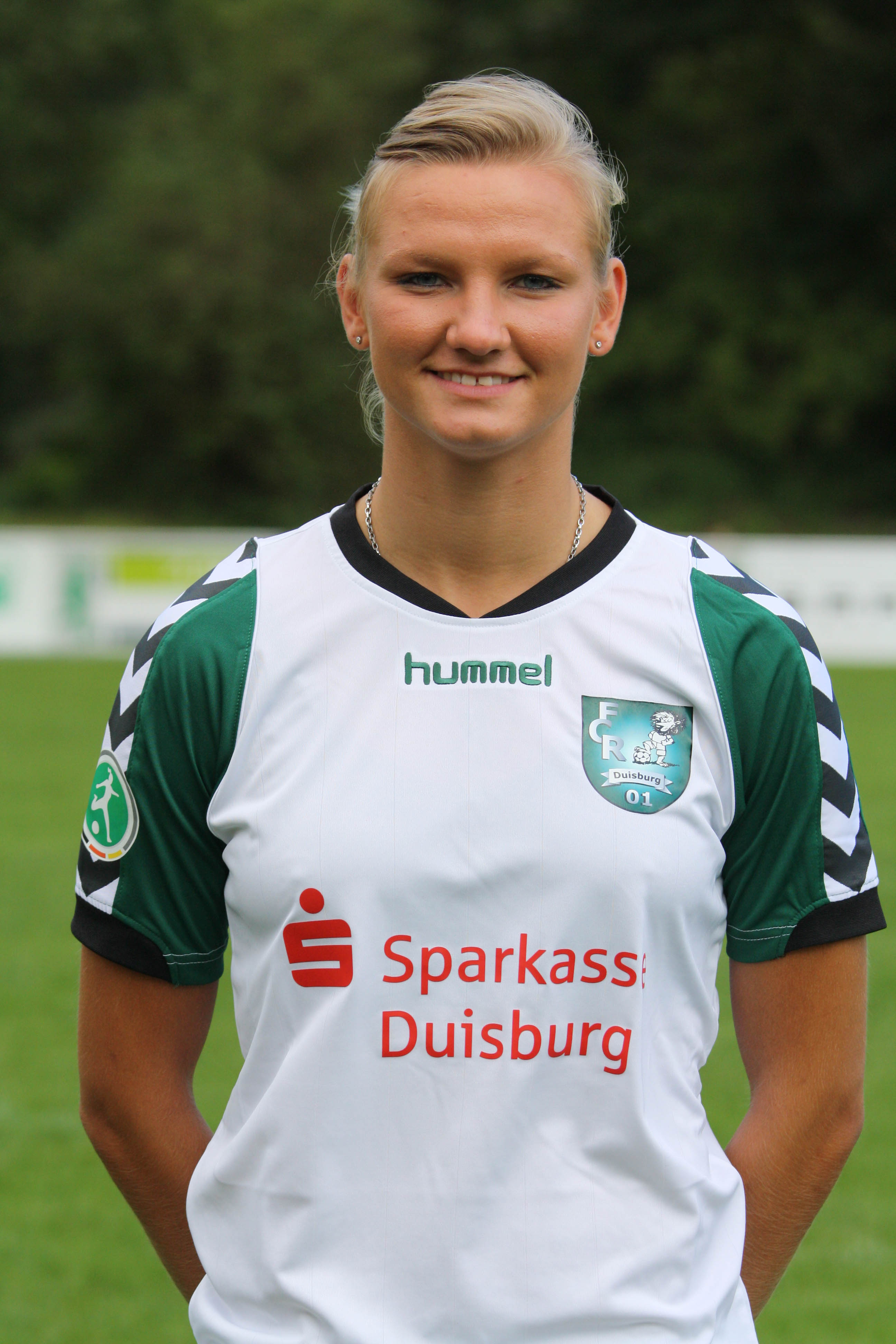 Alexandra Popp, FCR 2001 Duisburg, Saison 2011/12